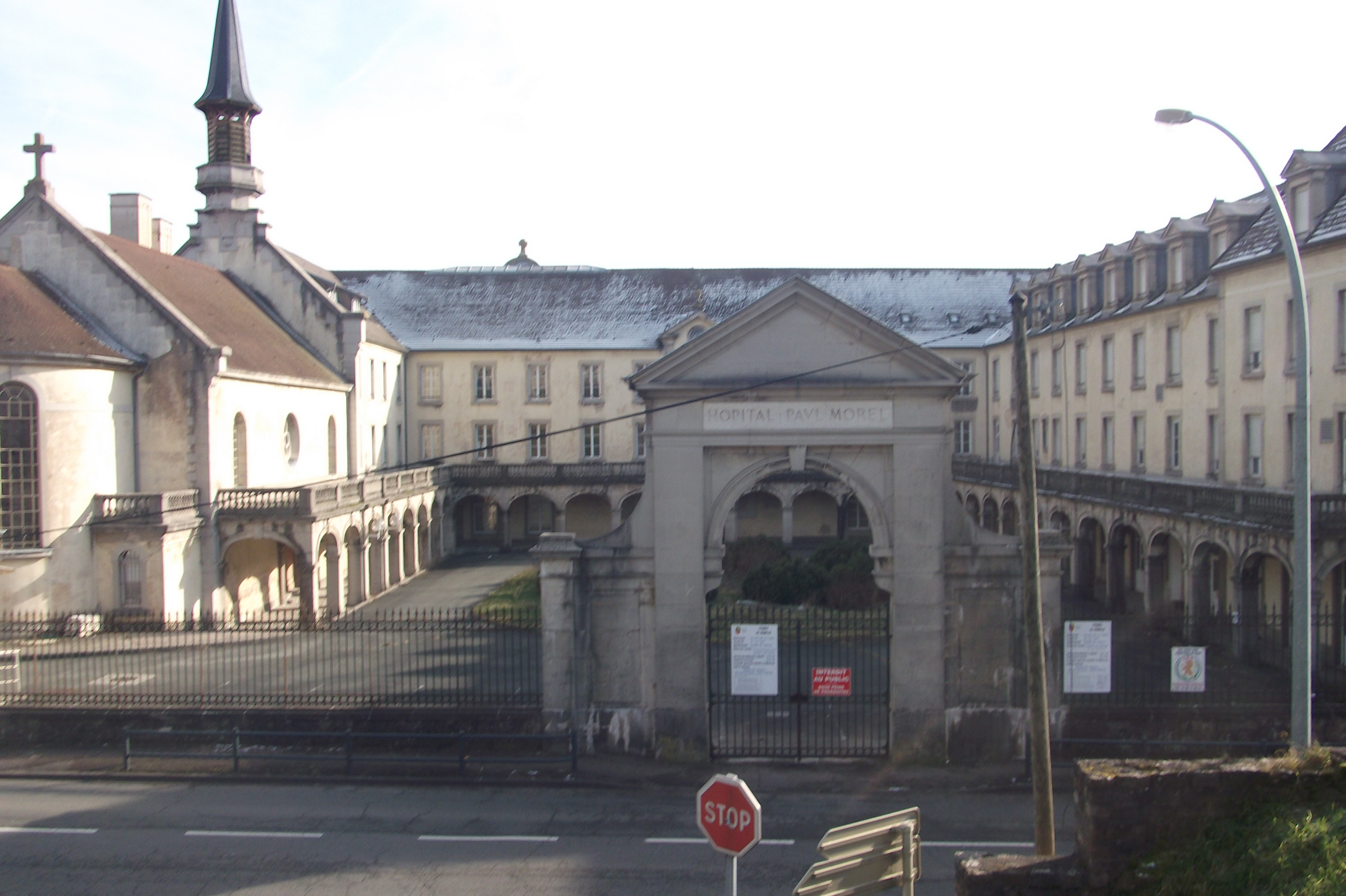 L'Hôpital Paul-Morel de Vesoul